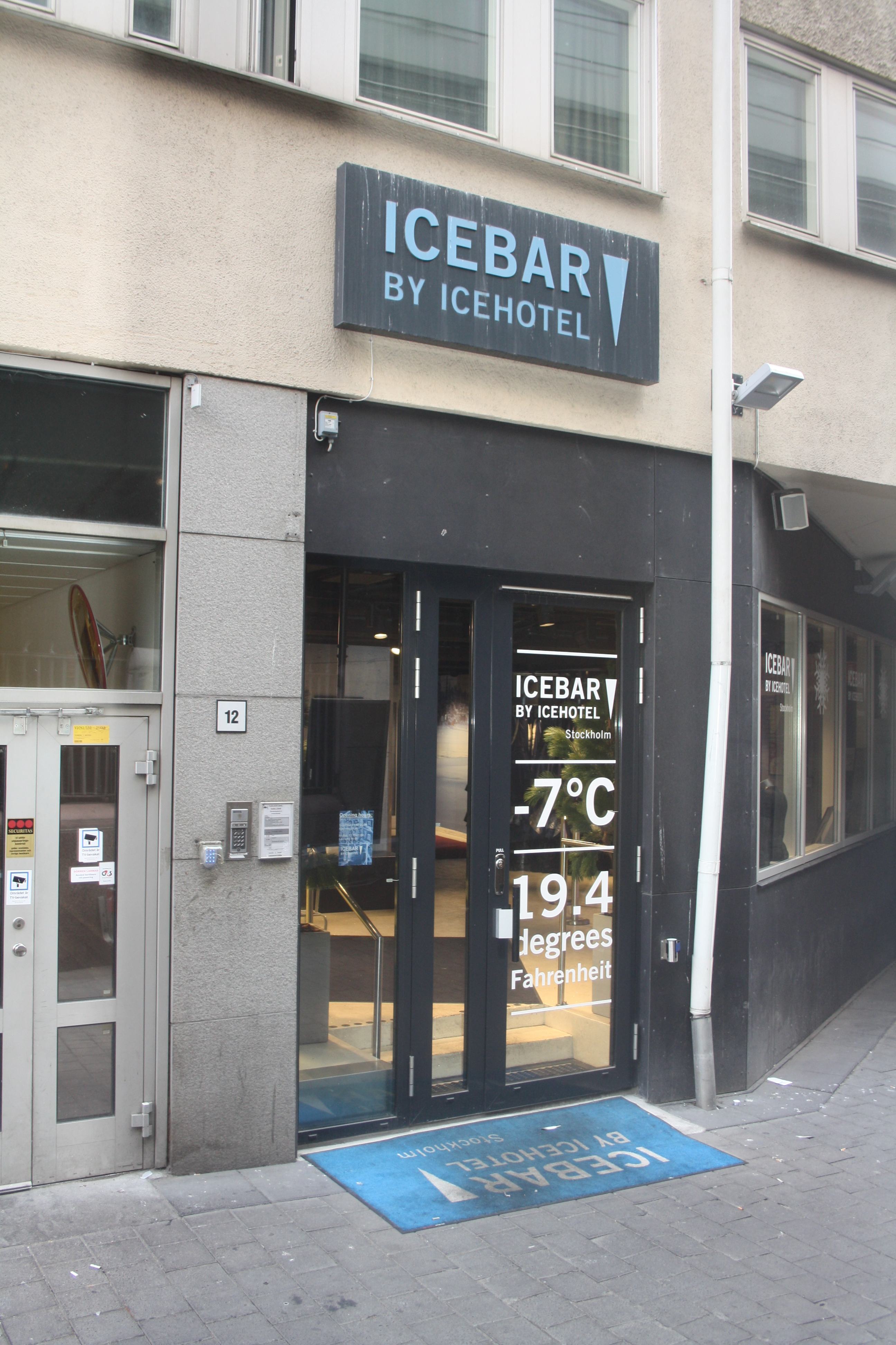 Ingång till Icebar i Stockholm